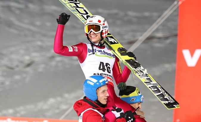 Konkurs indywidualny mężczyzn na skoczni K-120 podczas Mistrzostw Świata w Narciarstwie Klasycznym 2013